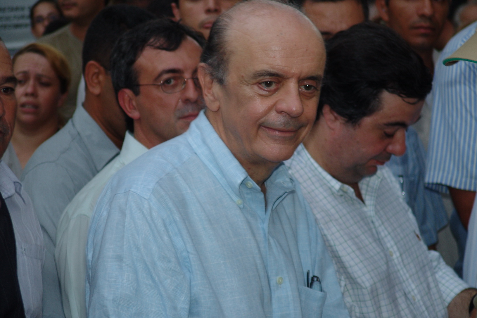 Governador José Serra durante a inauguração da 44º EMAPA em Avaré, São Paulo, Brasil